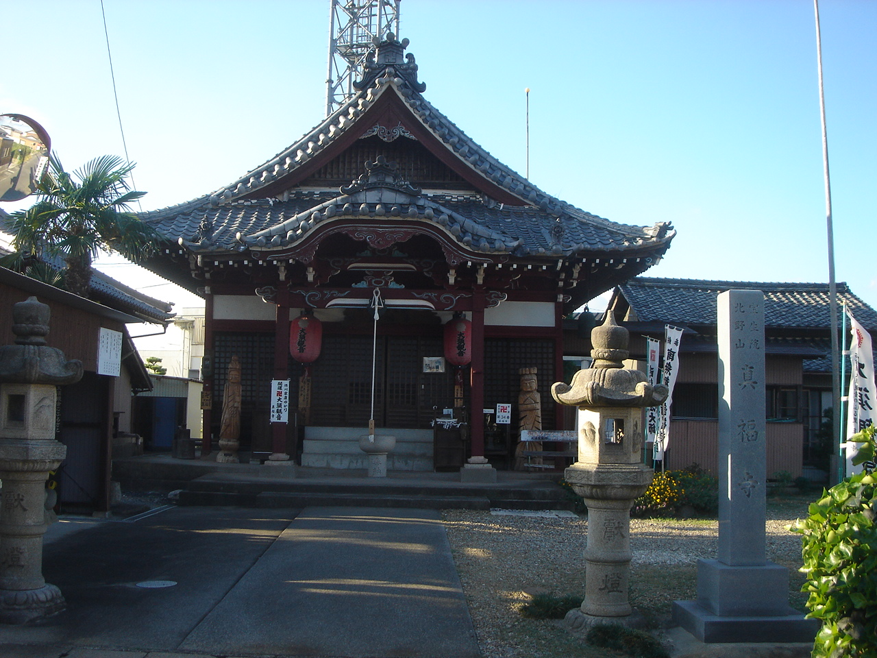 Shinfuku-ji(Temple) in Gifu Pref(真福寺 (羽島市)),Hashima,Gifu,Japan(岐阜県羽島市)で撮影